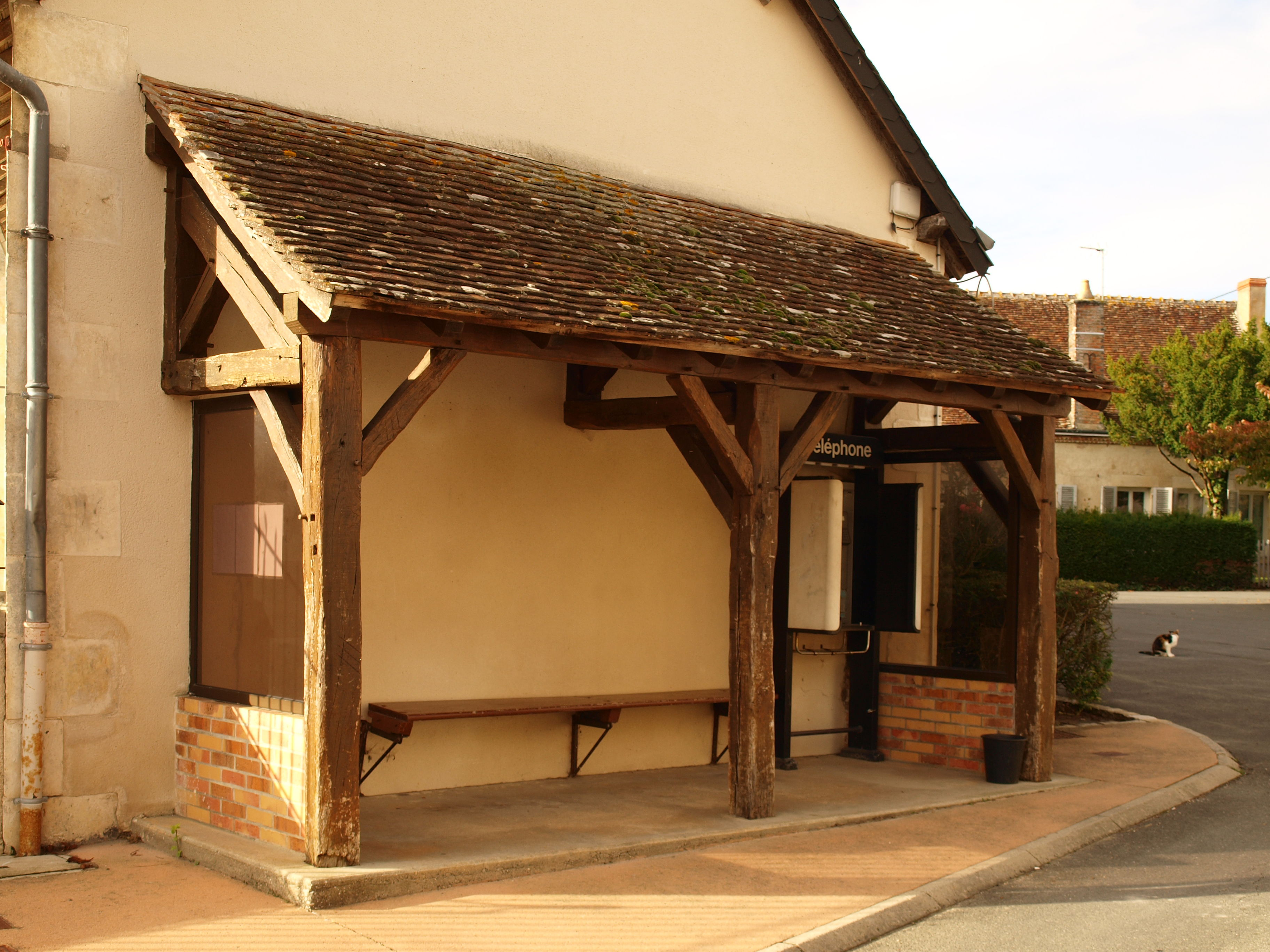 Saint-Valentin (Indre, France) ; abribus de la mairie-école